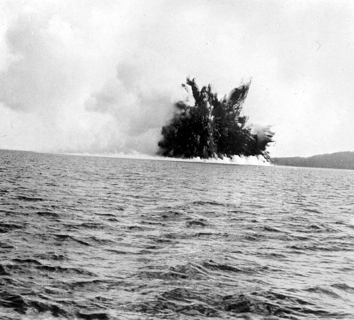 Repronegatief. Uitbarsting van de Krakatau